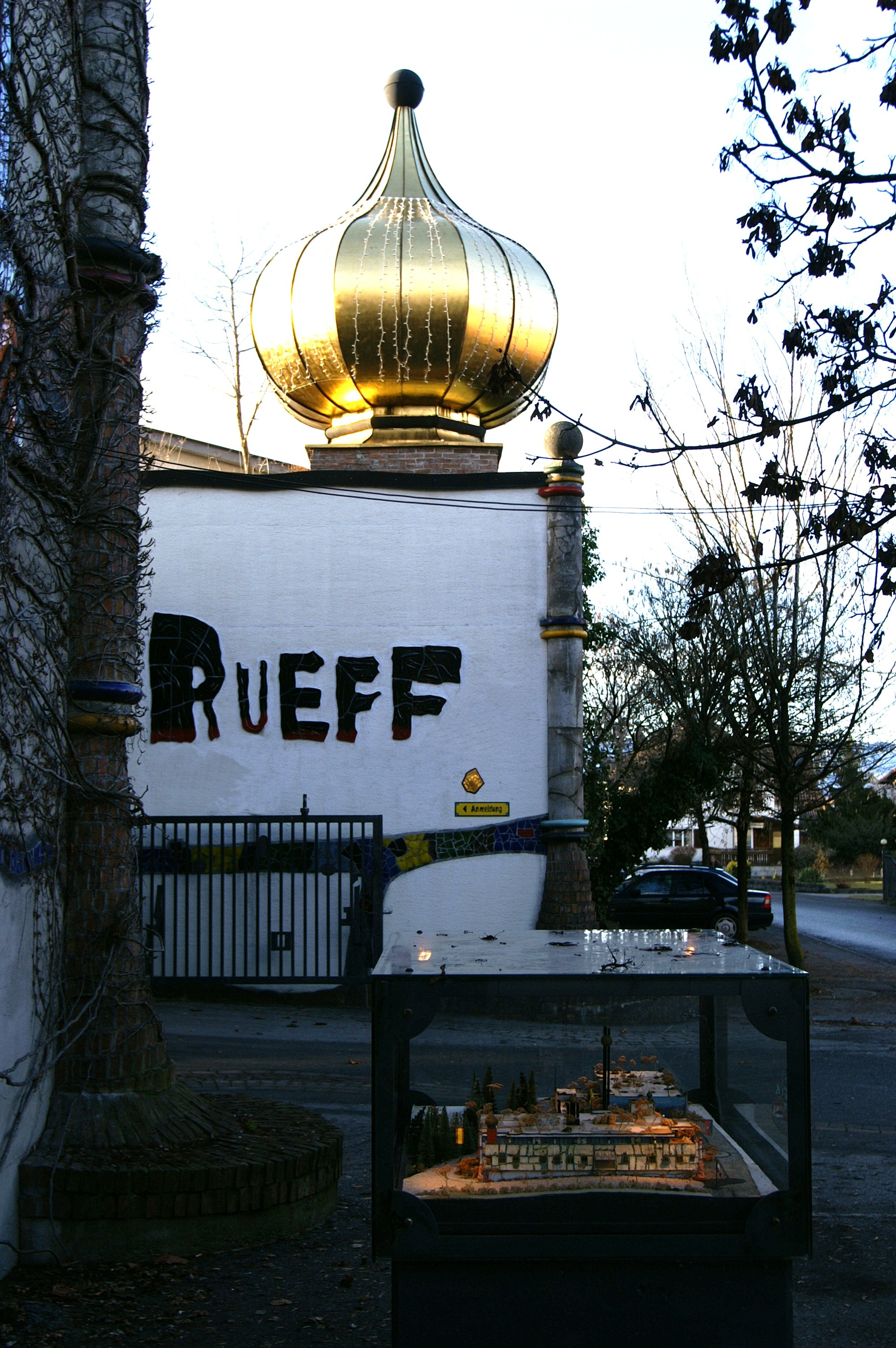 “Rueff Textil” 1988 von Friedensreich Hundertwasser gestaltet in Röthis, Vorarlberg